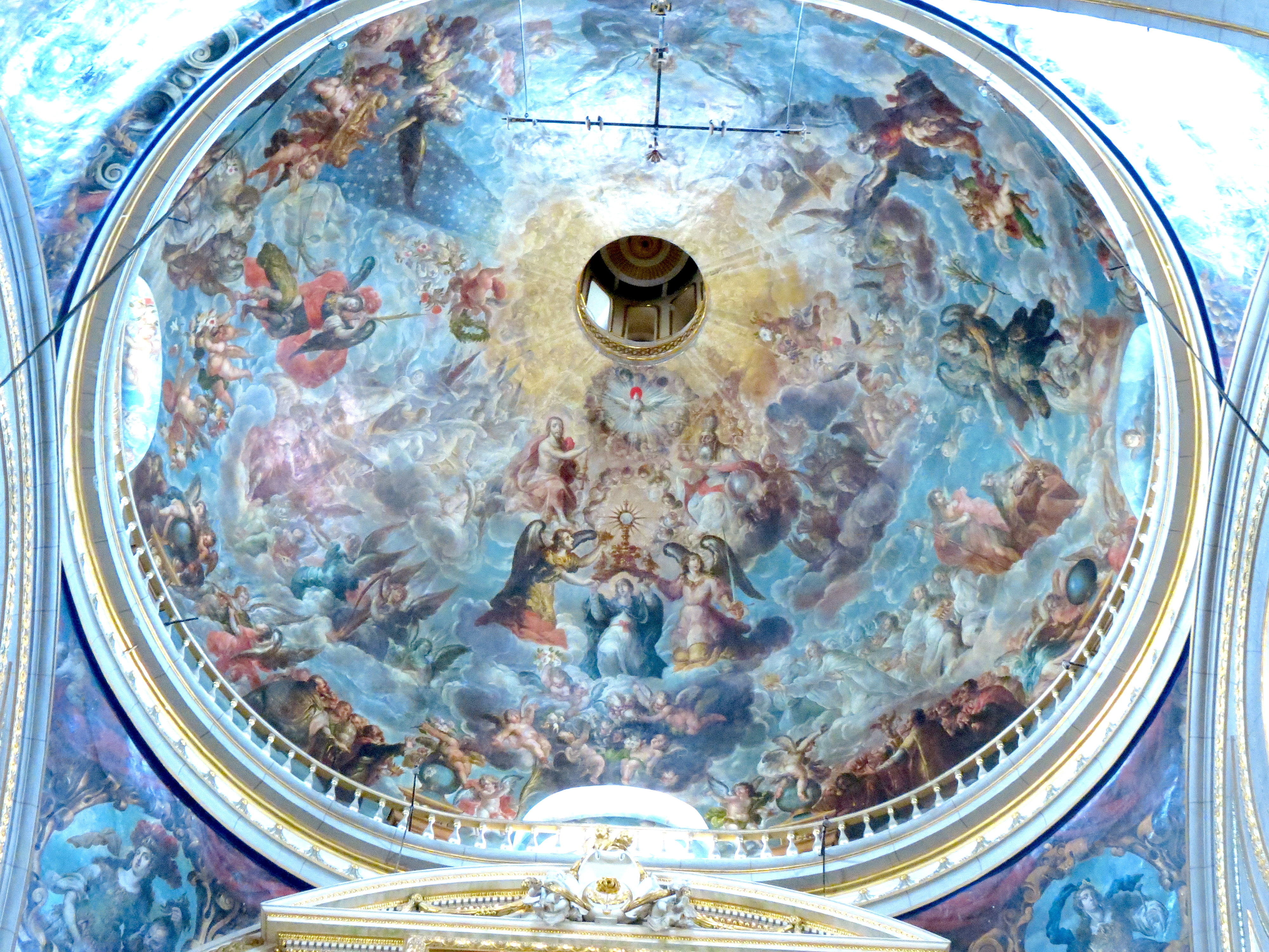 Cúpula del Retablo de los Reyes de la Catedral de Puebla, con fresco.